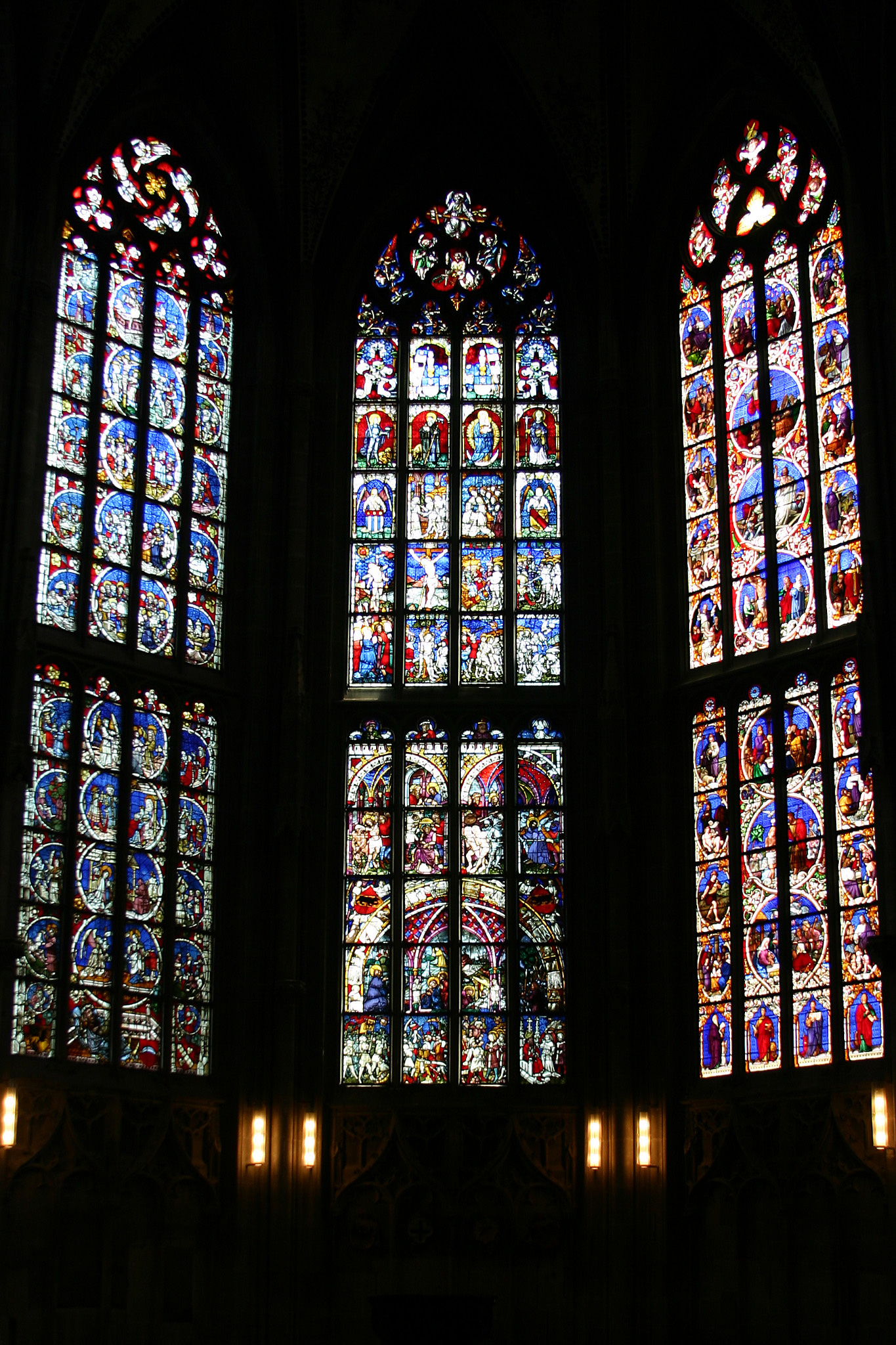 Münster, Bern, Schweiz